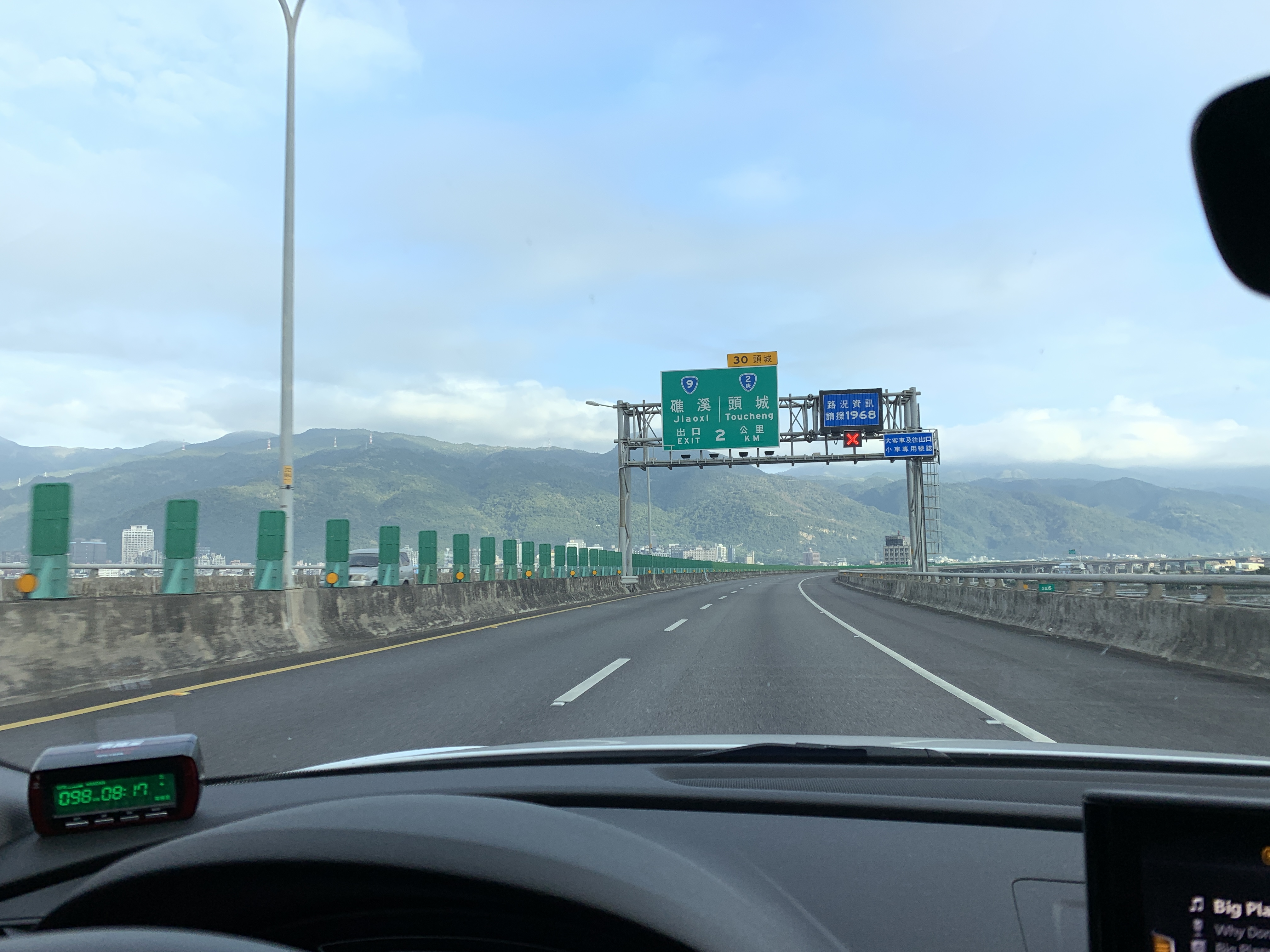 中文（台灣）: 國道五號位於礁溪路段